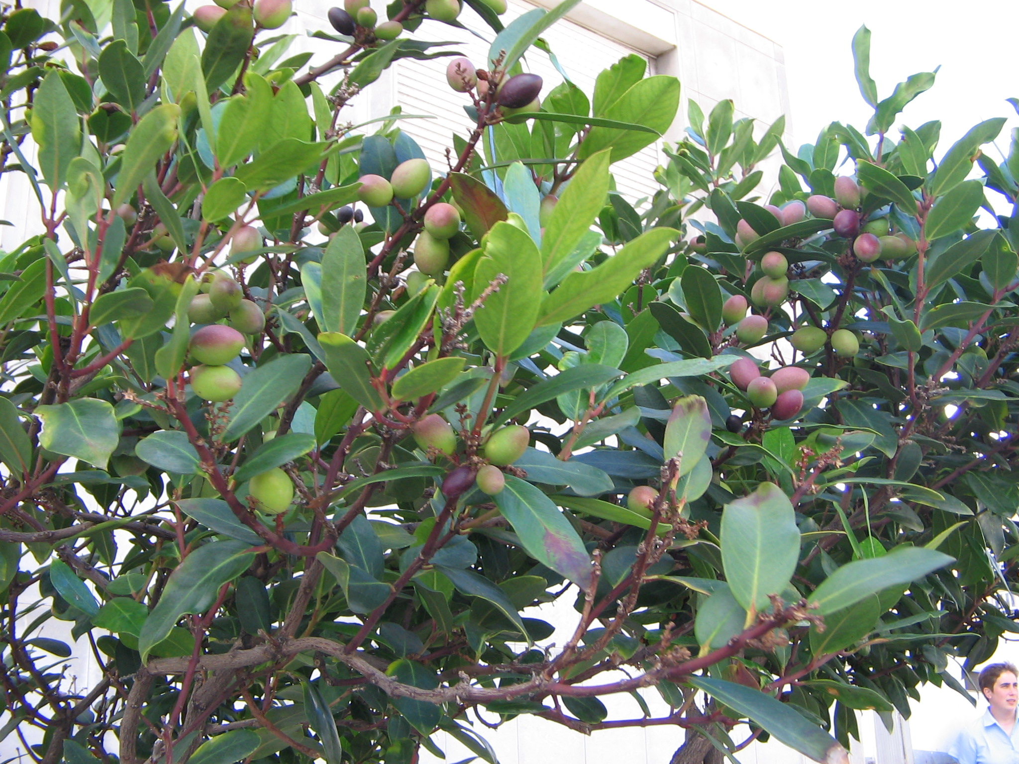 Persea indica (fruits) - Photographié à La Palma